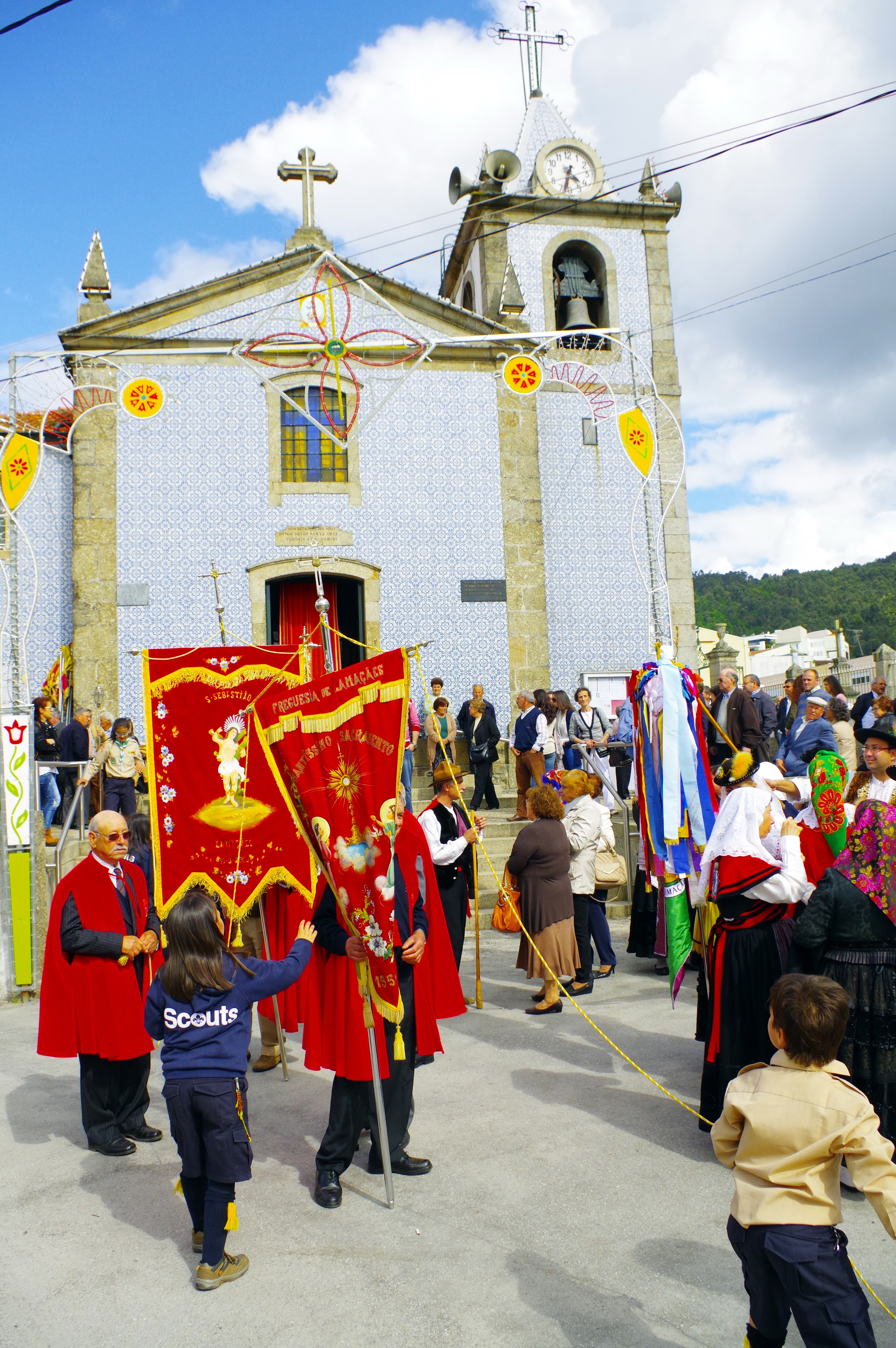 21.4.14 Lamacaes 1 Easter Monday Parade 070